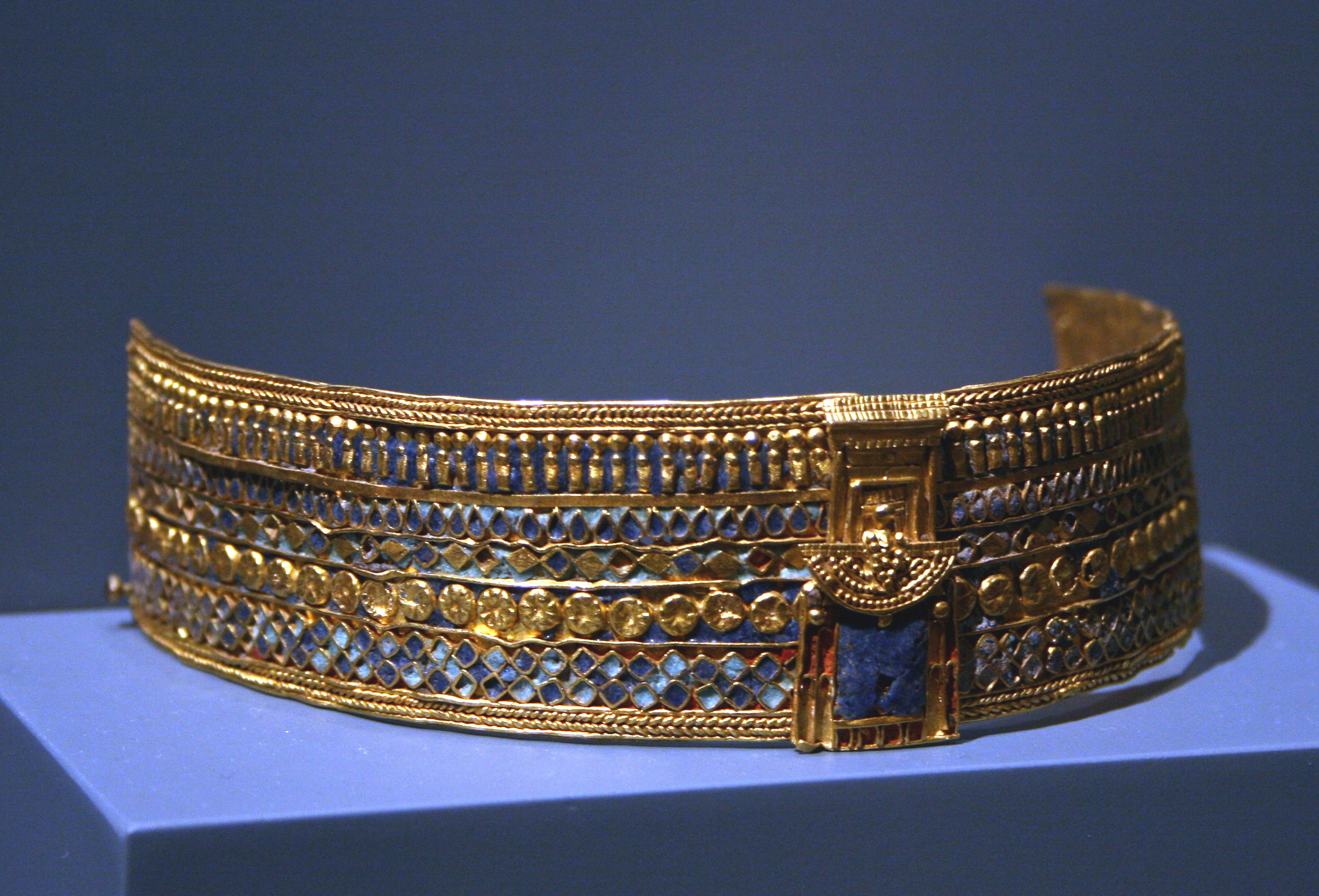 Schulterkragen der Amanishakheto aus Meroe (heute: Ägyptisches Museum Berlin, Inv. Nr. 22877)